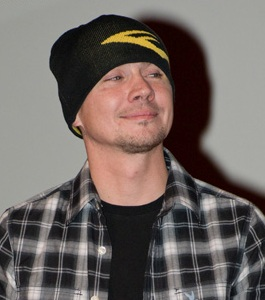 Денис Никифоров на премьере фильма "Бой с тенью 3" 11 ноября 2011